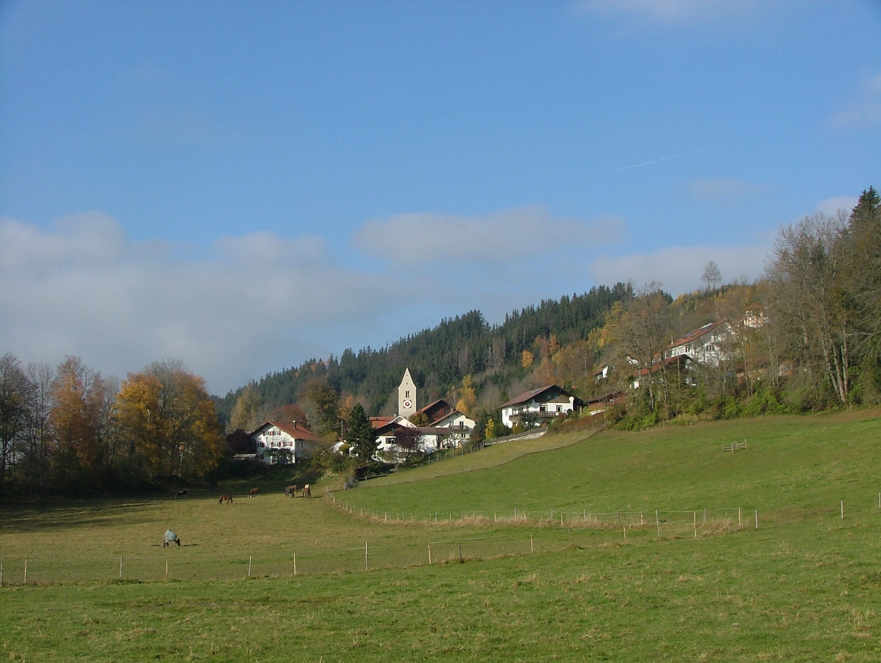 Schrattenbach